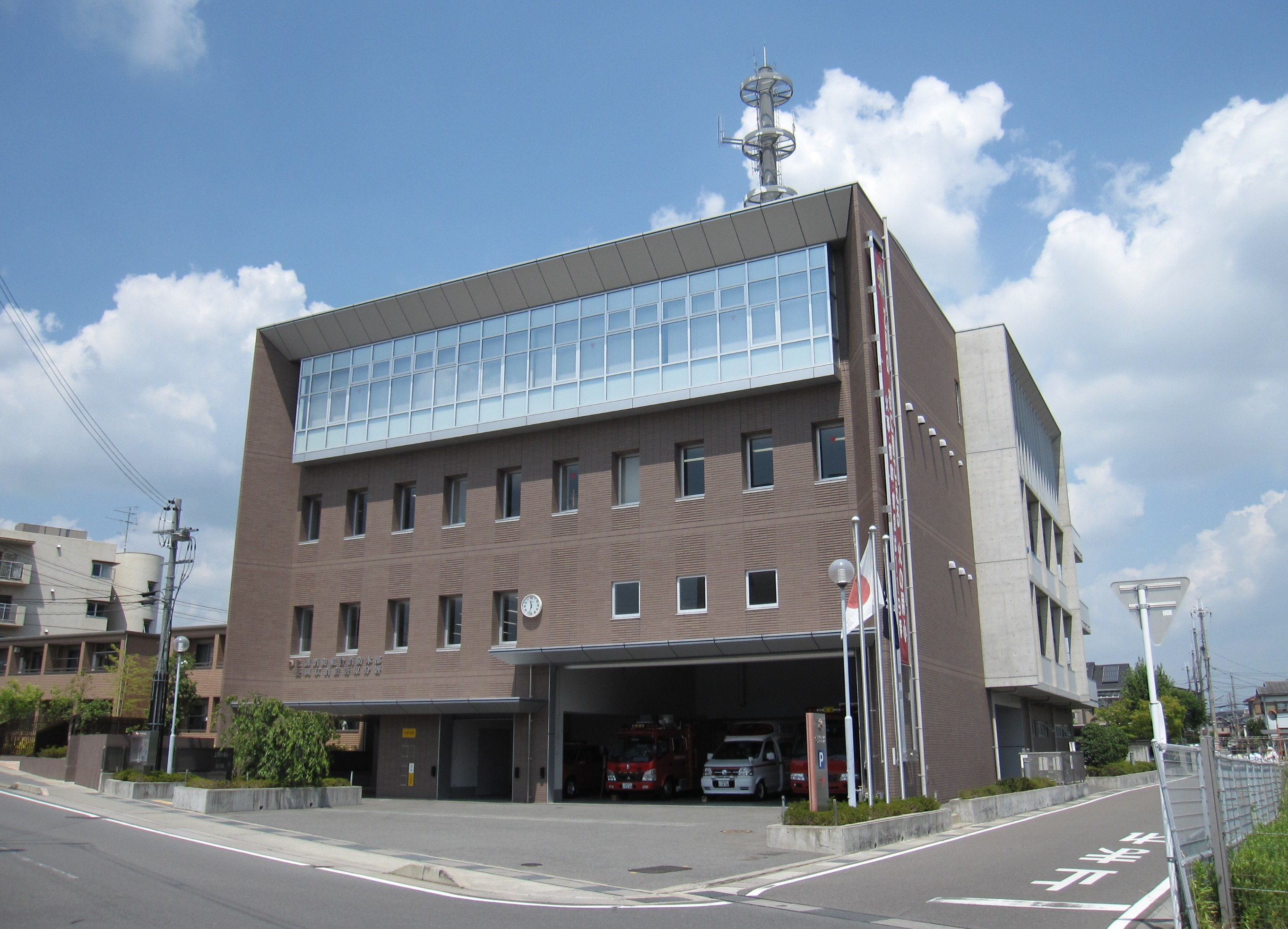 乙訓消防組合消防本部